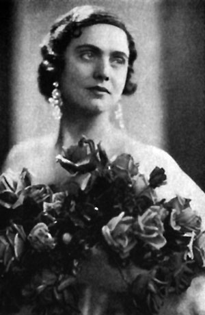 Gertrud Pålson-Wettergren